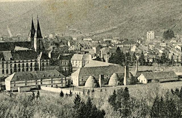 Faïencerie Dondelinger, Echternach